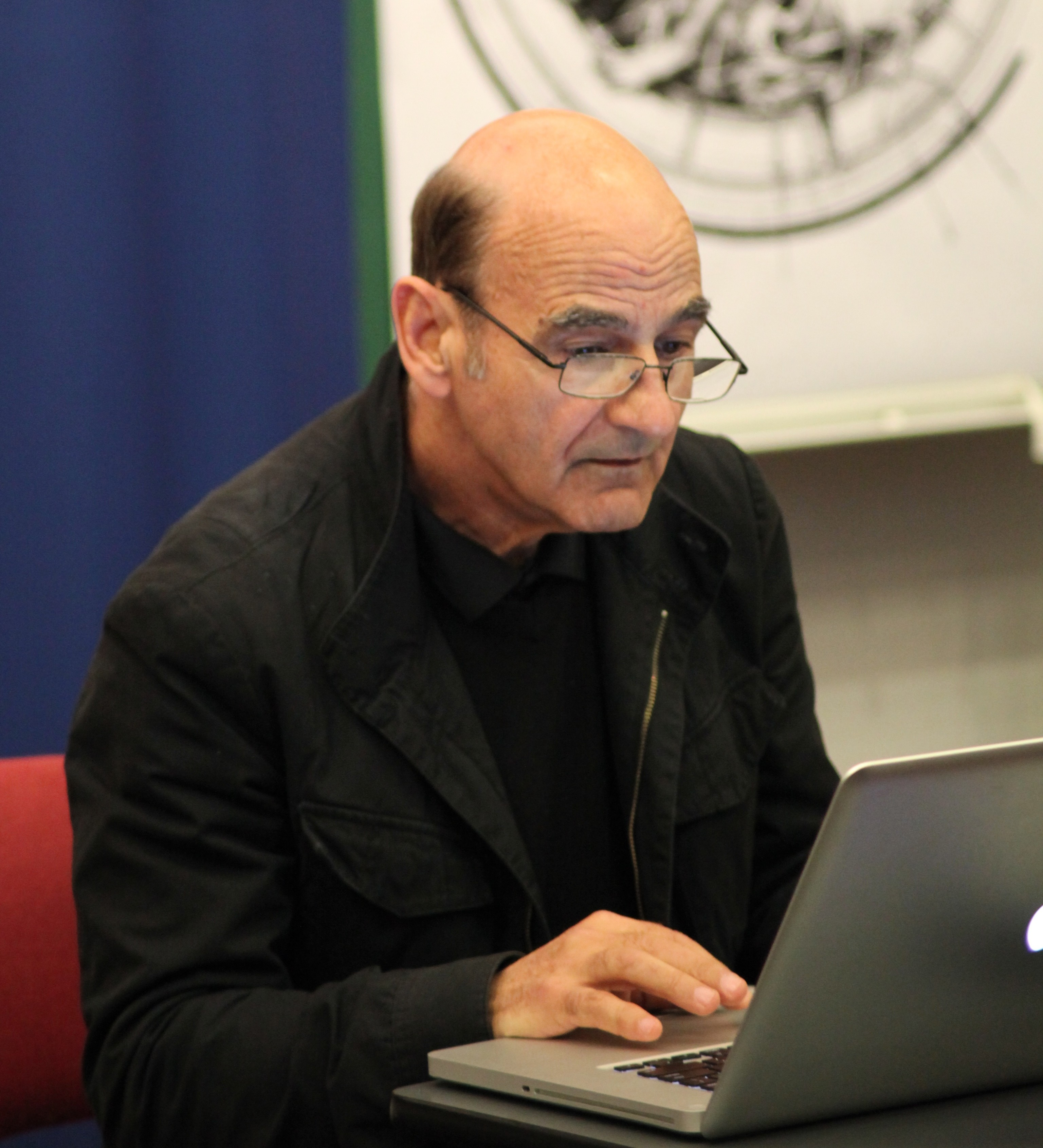 Stelarc at VirtualFutures